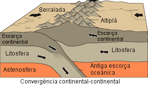 Convergència continental-continental